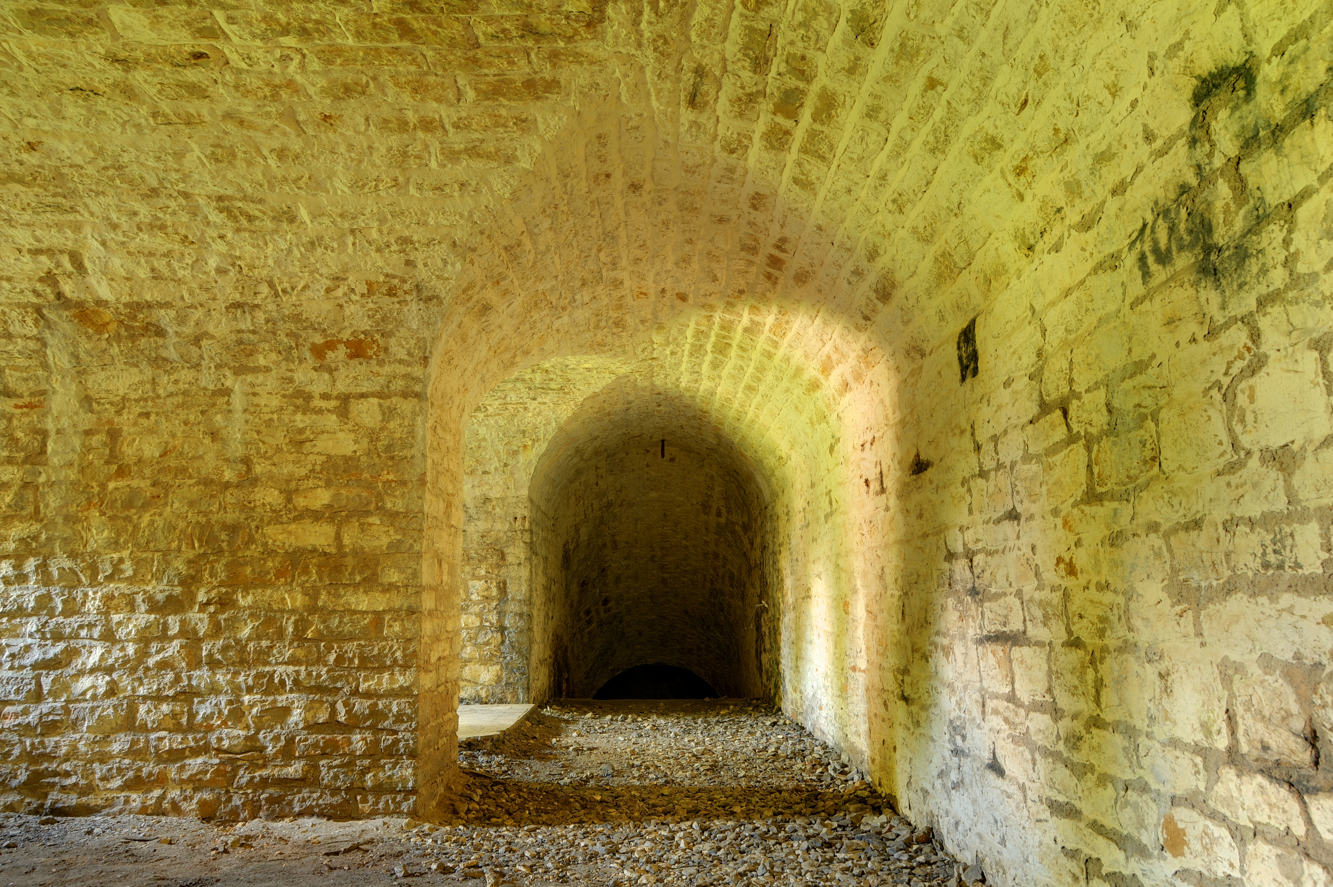 Fort des Basses Perches : dans le coffre de contrescarpe Sud-Ouest. Basses perches fortifications.